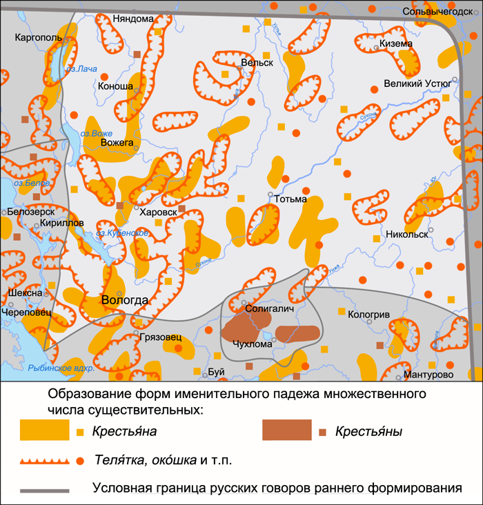 Карта распространения форм именительного падежа множественного числа существительных типа крестьяна / крестьяны, телятка, окошка на территории Вологодской группы говоров. Источник: Захарова К. Ф., Орлова В. Г., Сологуб А. И., Строганова Т. Ю. Образование севернорусского наречия и среднерусских говоров / ответственный редактор В. Г. Орлова. — М.: Наука, 1970. — С. 218 (карта 62. Образование формы им. п. мн. ч. существительного крестьянин), С. 219 (карта 63. Образование формы им. п. мн. ч. существительных с суффиксом -к-, обозначающих молодые существа: око́ш/ка/, теля́т/ка/ и т. д.)